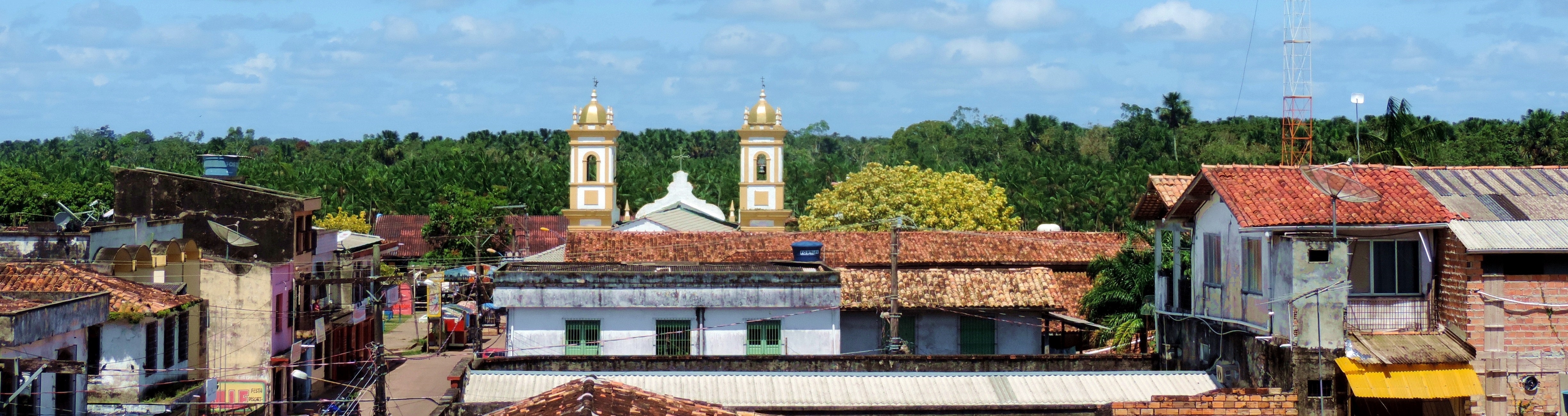 ssd